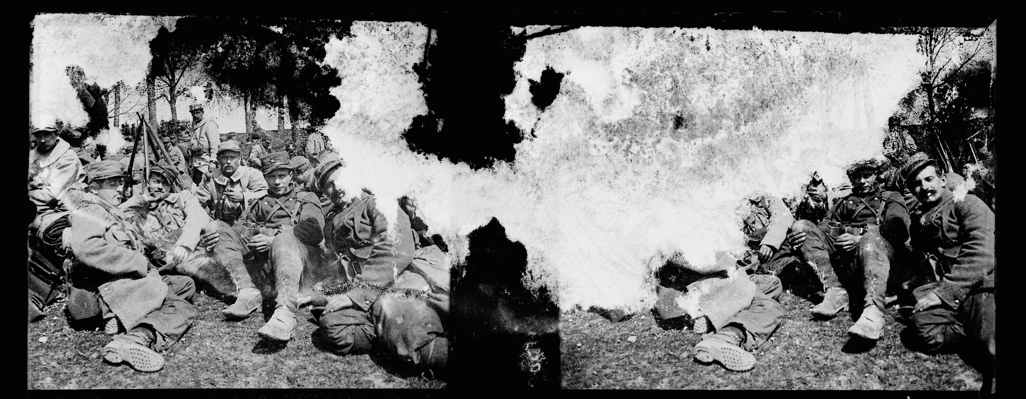 Passage du 4e régiment d'artillerie à Saleux (Somme). 1915. Guerre 1914-1918.